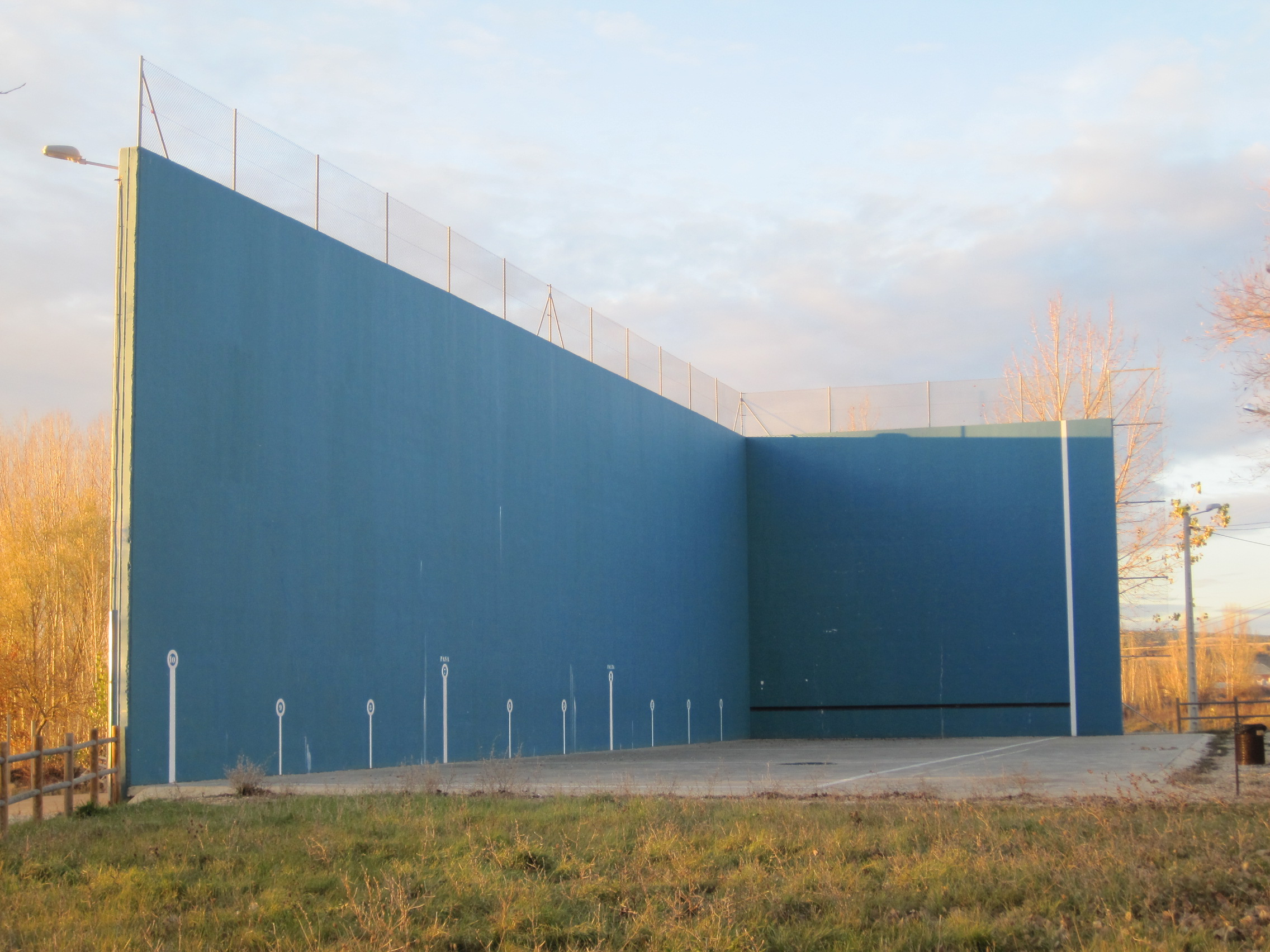 Frontón de Quintanarraya (Burgos, España).